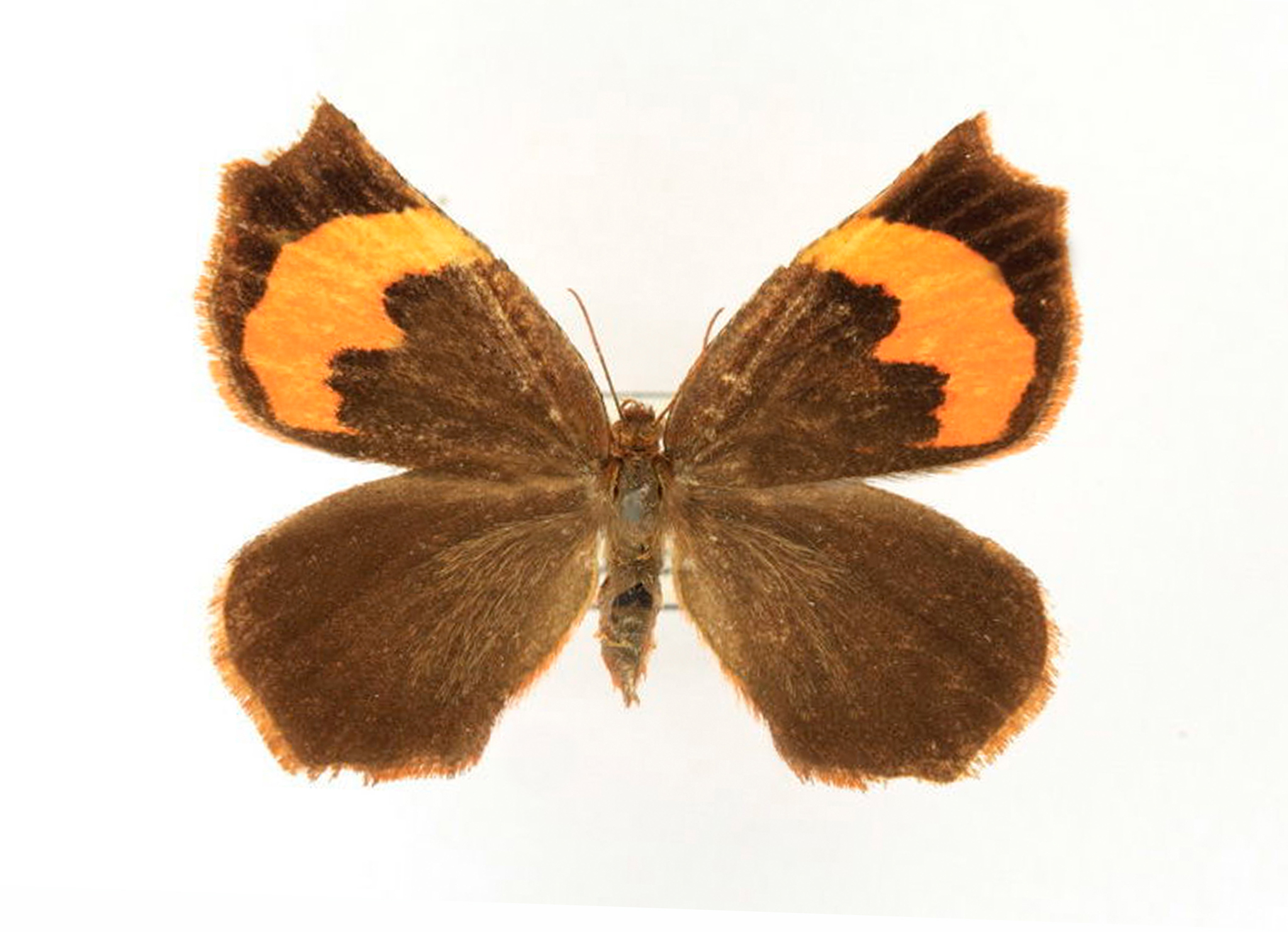 Pterodecta felderi